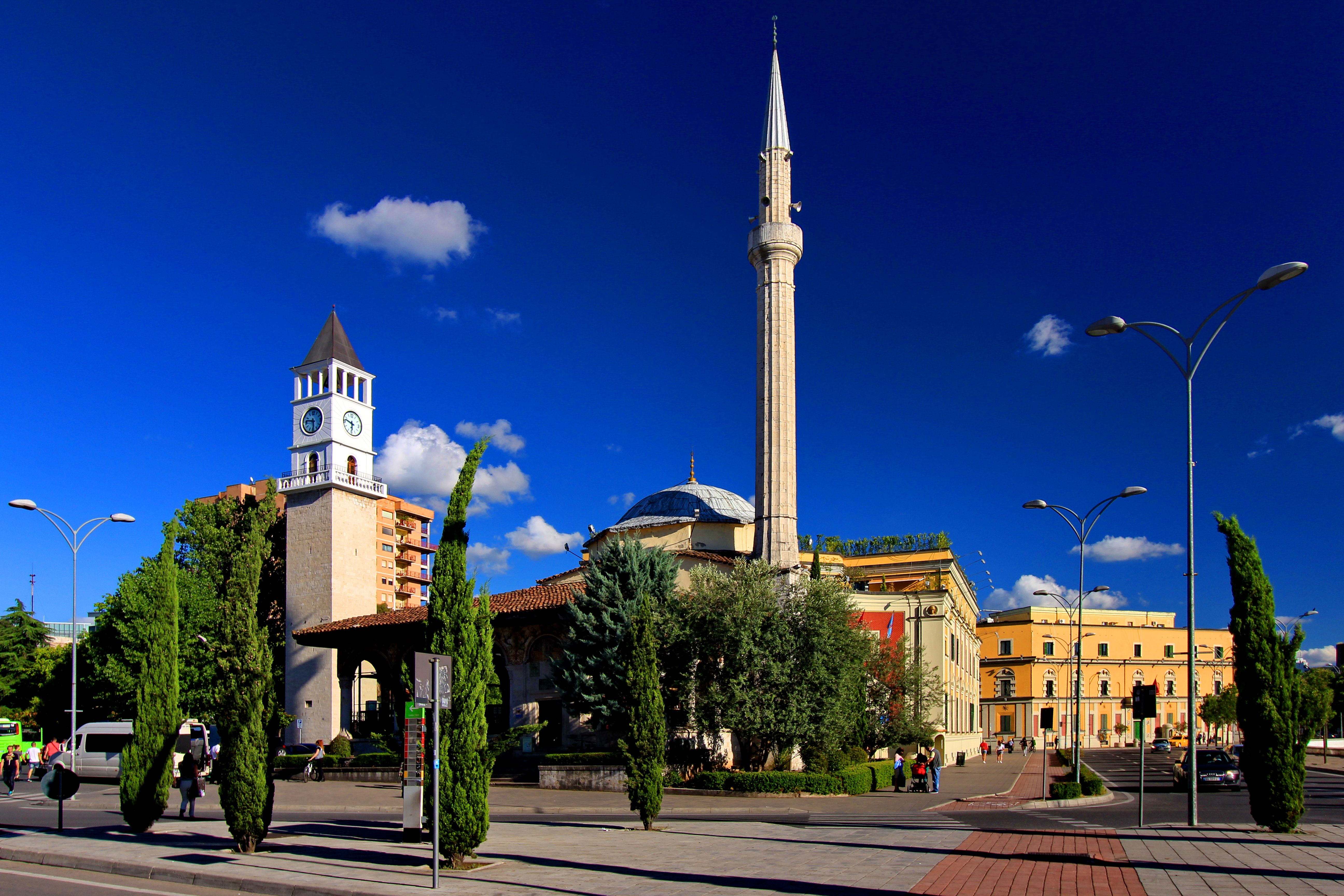 Kulla e Sahatit (Tiranë)